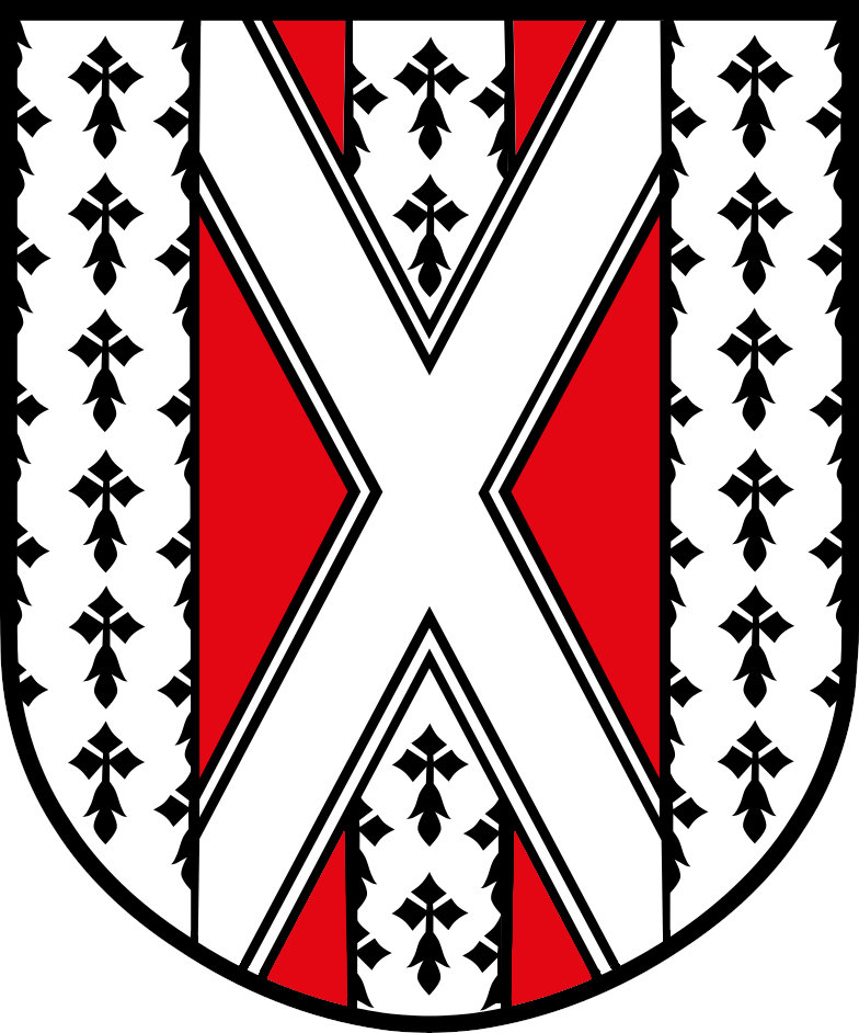 Wappen der Gemeinde Öblarn in Österreich